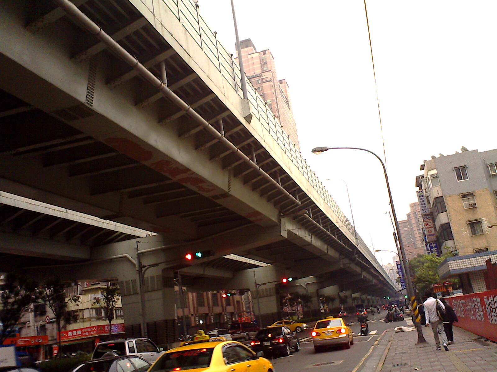 中文（台灣）: 位於臺北縣中和市景平路上方臺64線的板橋~中和段